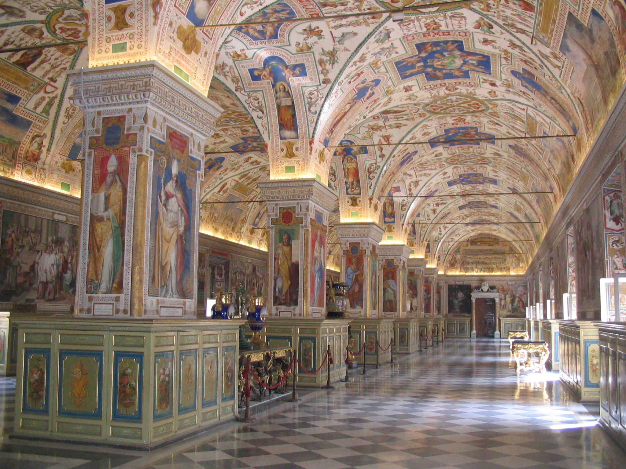 Der Salone Sistino in der vatikanischen Bibilothek in Rom